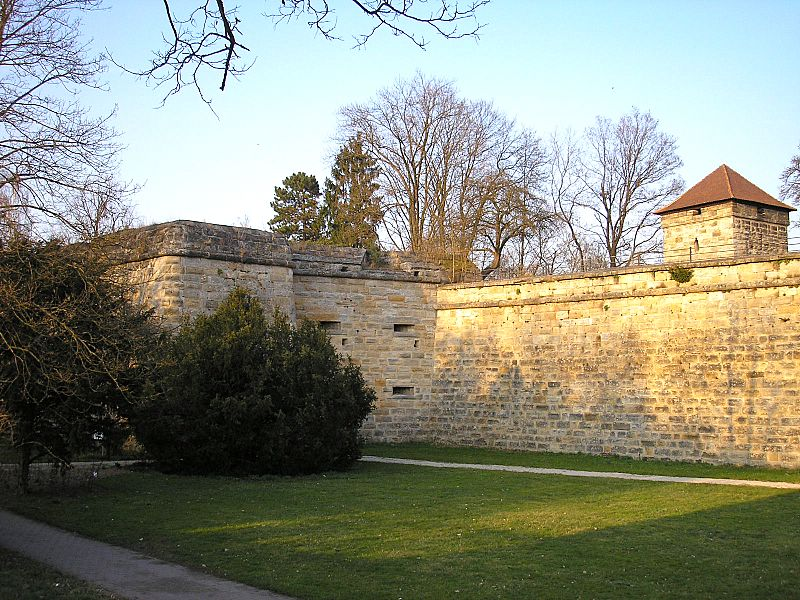 Festung Forchheim (Oberfranken). Bastion am Saltorturm. Eigene Aufnahme, März 2006 / Fortress Forchheim (Upper Franconia, Germany). Saltor-Bastion and gate. Own photo, March 2006